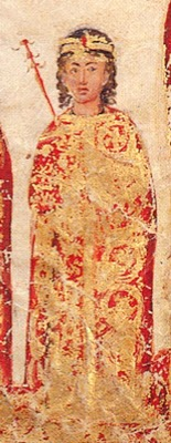 Miniatura del siglo XV que representa a Andrónico Paleólogo.